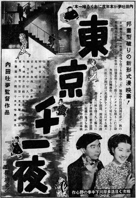 『東京千一夜』公開時の雑誌広告、『サンデー毎日秋の映画號』(大阪毎日新聞社、1938年10月)